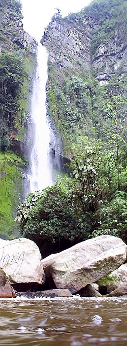 Panorámica de La Cascada La Chorrera, Venecia Cundinamarca.